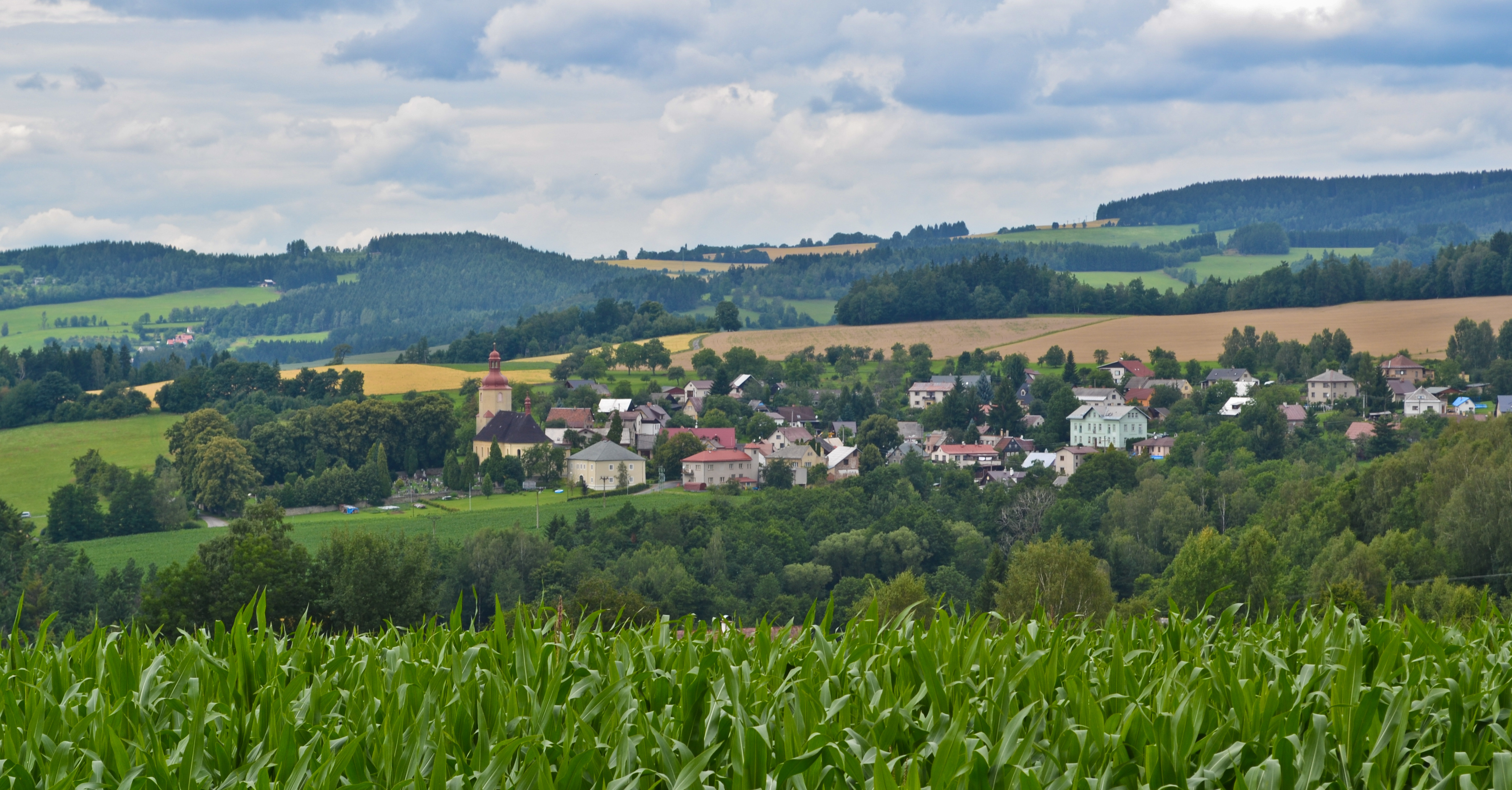 Letní pohled na Bzí z jihovýchodu